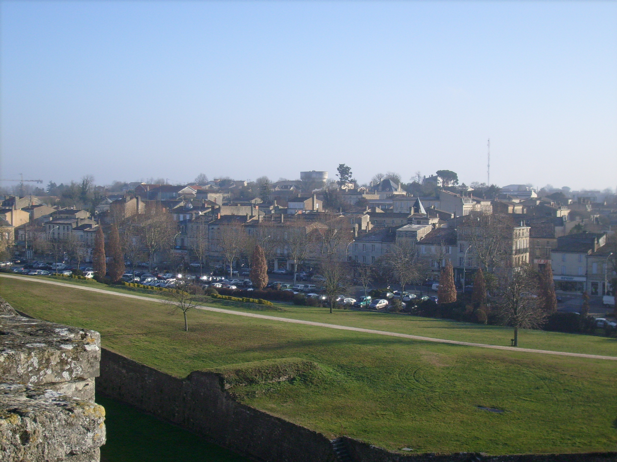 Une autre vue sur Blaye, Aquitaine, Gironde, France